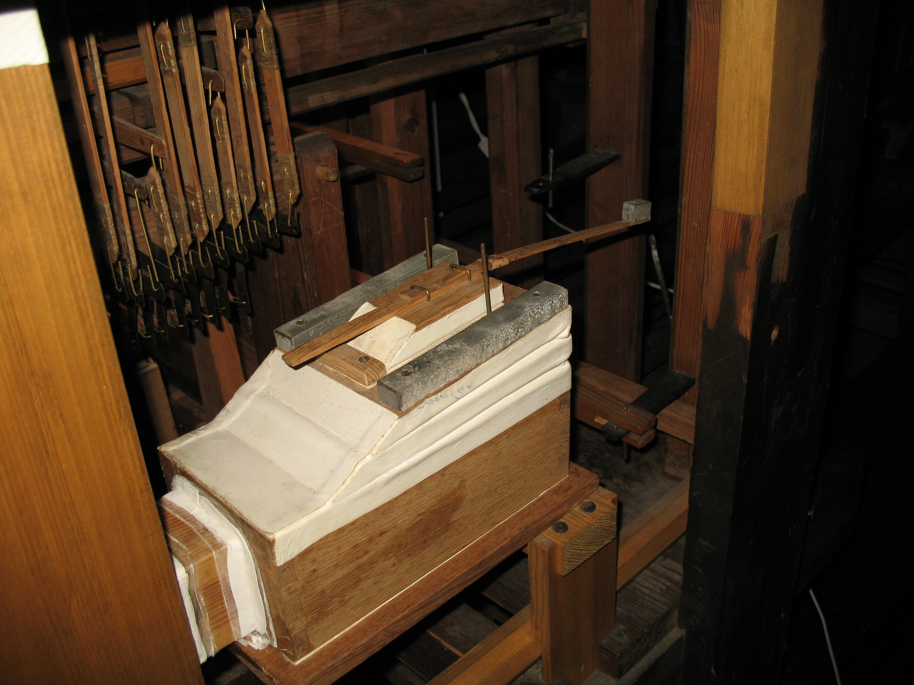 Esens (Kreis Wittmund, Ostfriesland, Niedersachsen), Evangelische Kirche St. Magnus, Wippfeder-Tremulant der 1848-60 von Arnold Rohlfs erbauten Orgel.